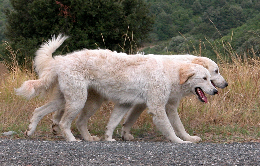 Cane da pastore Maremmano-Abruzzese (Maremme-Abruzzen-Schäferhund) Maremma: ein Maremma-Pärchen, fotografiert 2003 in der Toskana bei der Arbeit an einer Schafherde